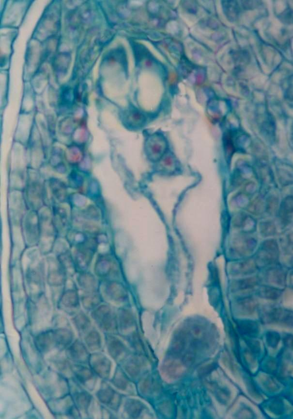 Saco embrionario dentro de un óvulo, gametófito femenino en angiospermas